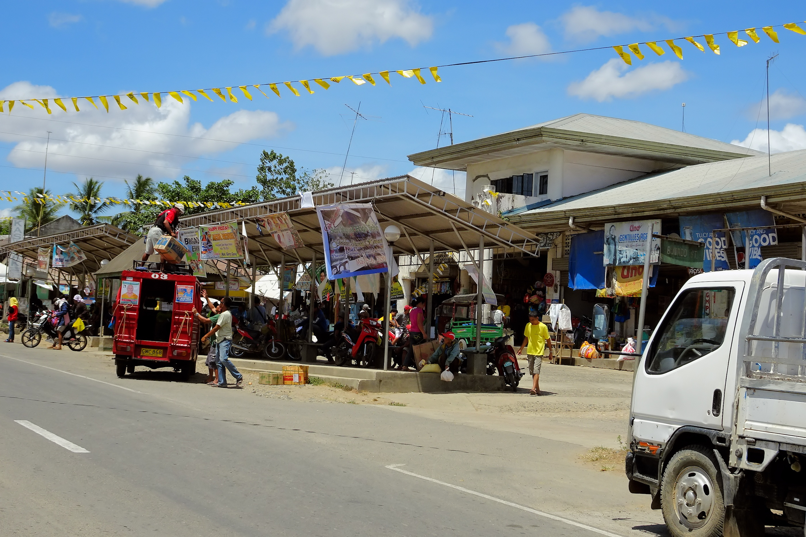 San Miguel, Bohol, Philippines